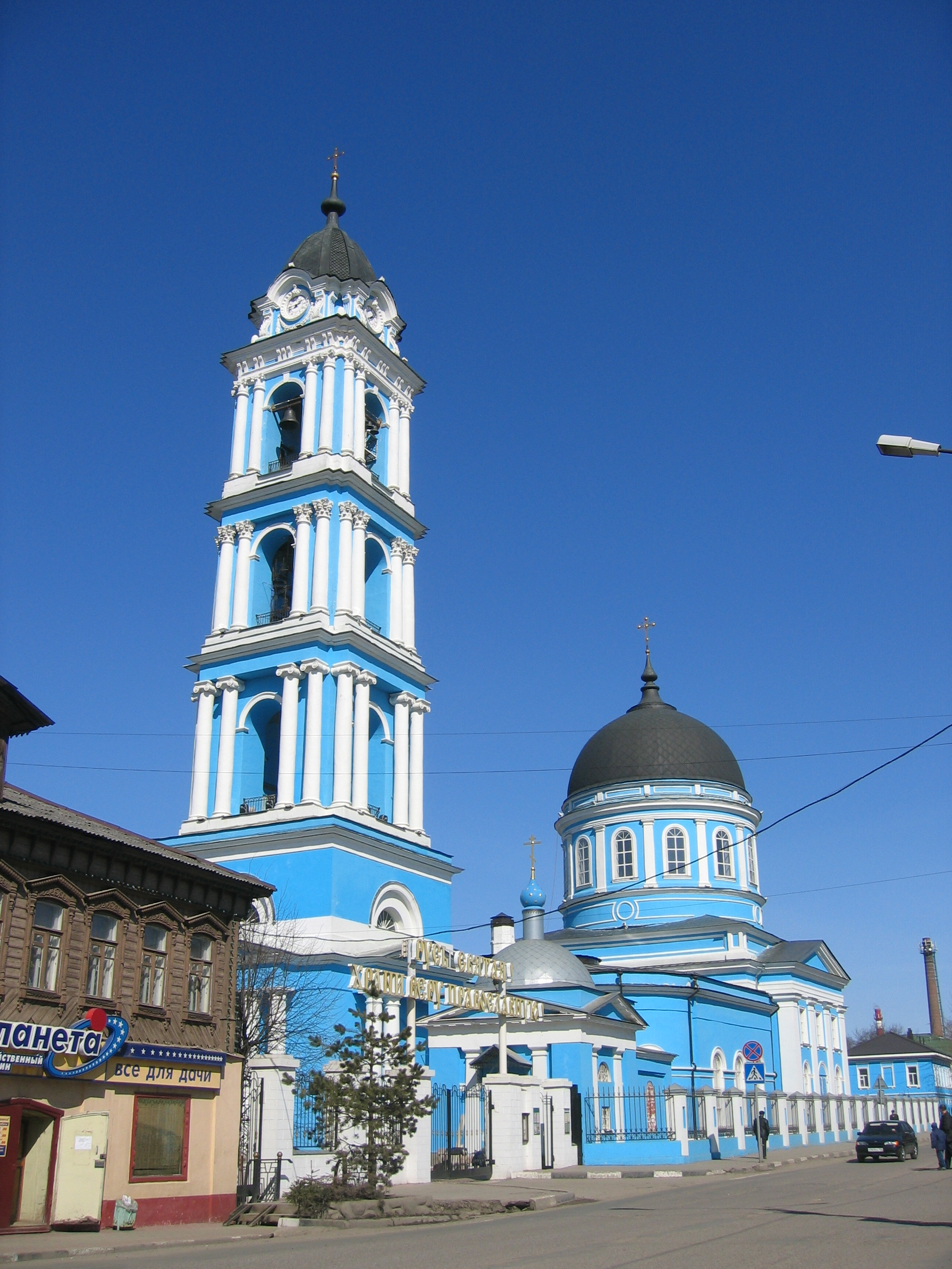 Богоявленский собор в Ногинске